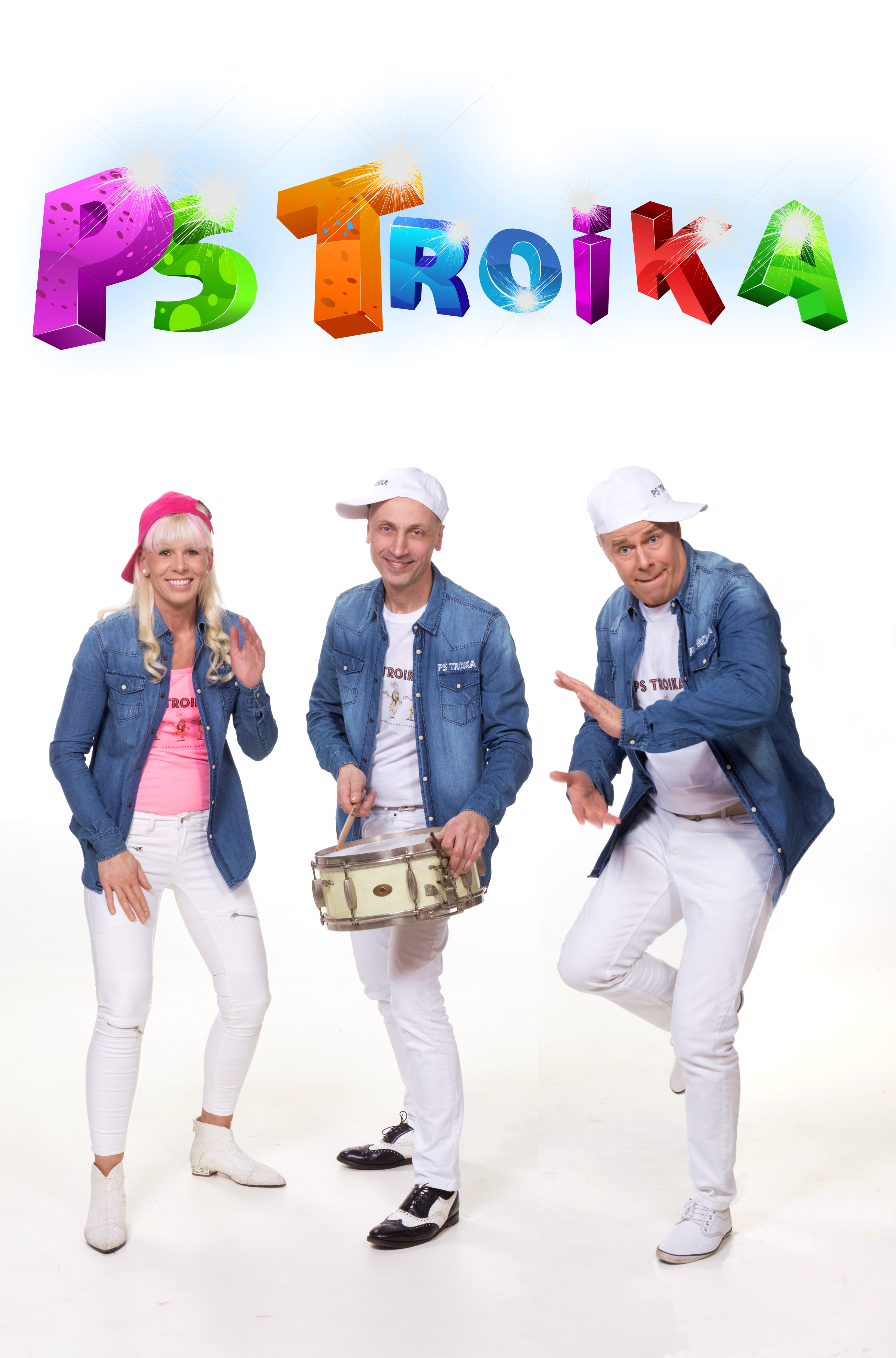 Elu on läinud lõbusamaks. :)